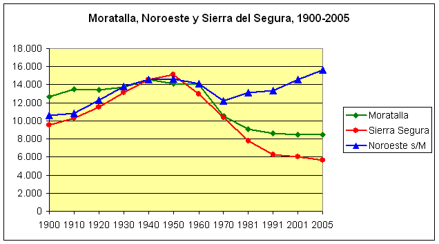 Cuadro 3. Moratalla (verde) frente a la evolución media de los municipios de la sierra del Segura (rojo) y las otras cuatro localidades del Noroeste (azul), suponiendo idéntica población en 1940 Población de Moratalla (Murcia, España) comparada con la evolución promedio de los otros municipios de la comarca del Noroeste y la evolución promedio de los municipios de la comarca albaceteña de la sierra del Segura. La población de los municipios imaginarios se calcula a partir del supuesto de una coincidencia plena en los datos de 1940. En conjunto se puede ver que la evolución demográfica de Moratalla es desde entonces más próxima a la segureña que a la de los otros municipios del Noroeste. Fuente: INE. Trabajo propio, cedido al dominio público.